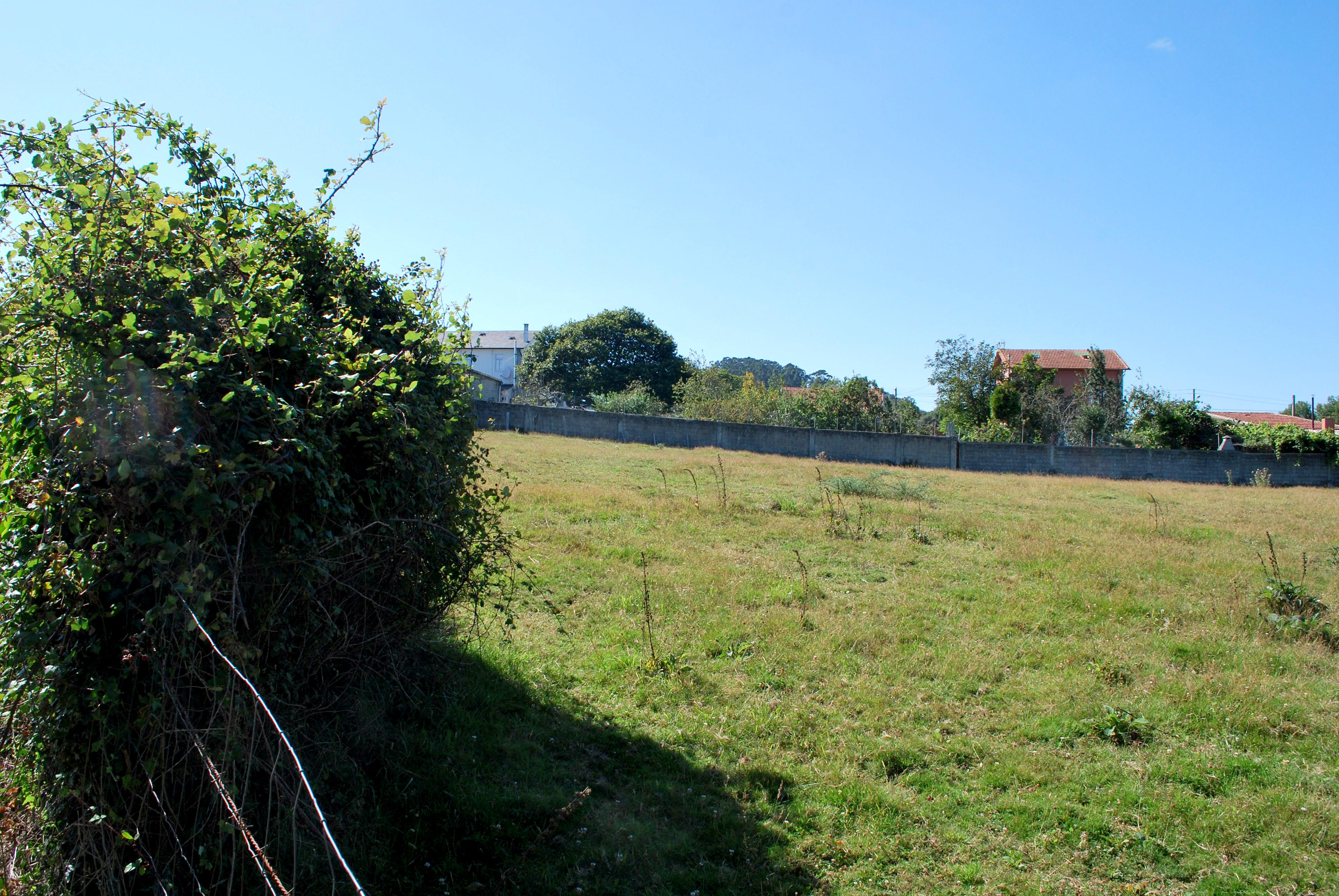 Chaira do castro de santa icía en Ferrol A Coruña